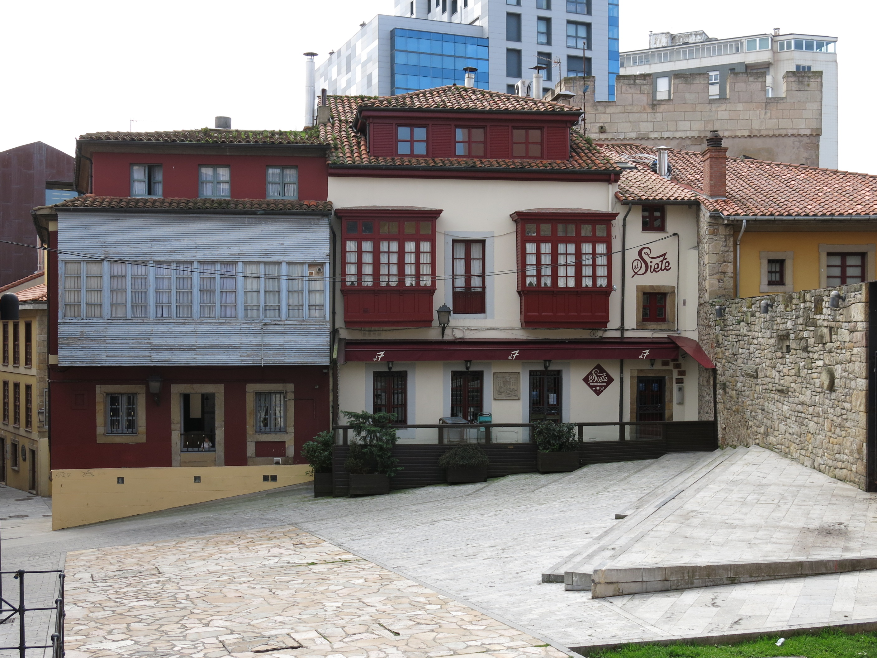 Conjunto Histórico Artístico El Barrio Viejo de Gijón